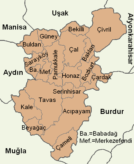 Denizli'nin ilçelerini gösteren harita